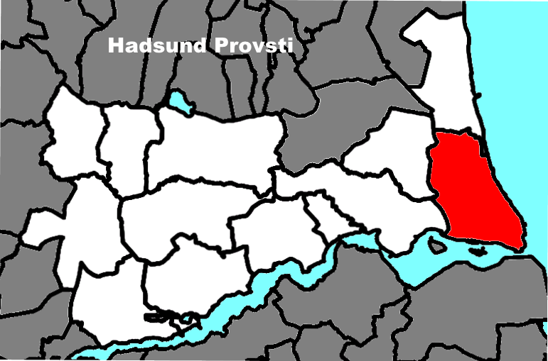 Sognets beliggenhed i Hadsund Provsti.